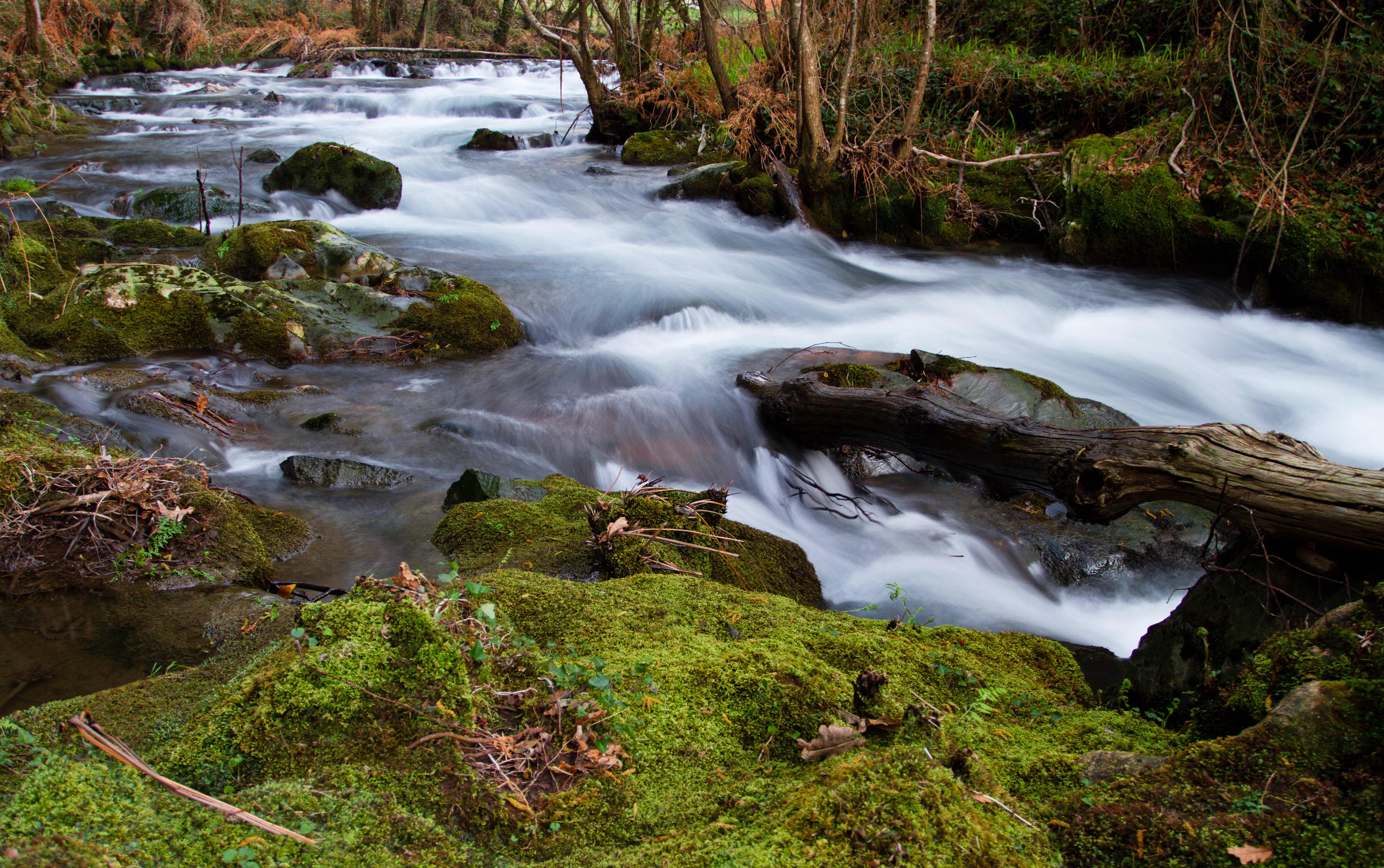 Tramo del río Baleo próximo a su desembocadura en la Ría de Ortigueira